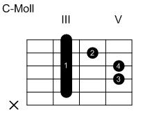 Eigenanfertigung